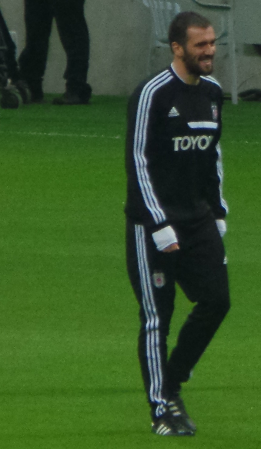 Serdar Kurtuluş